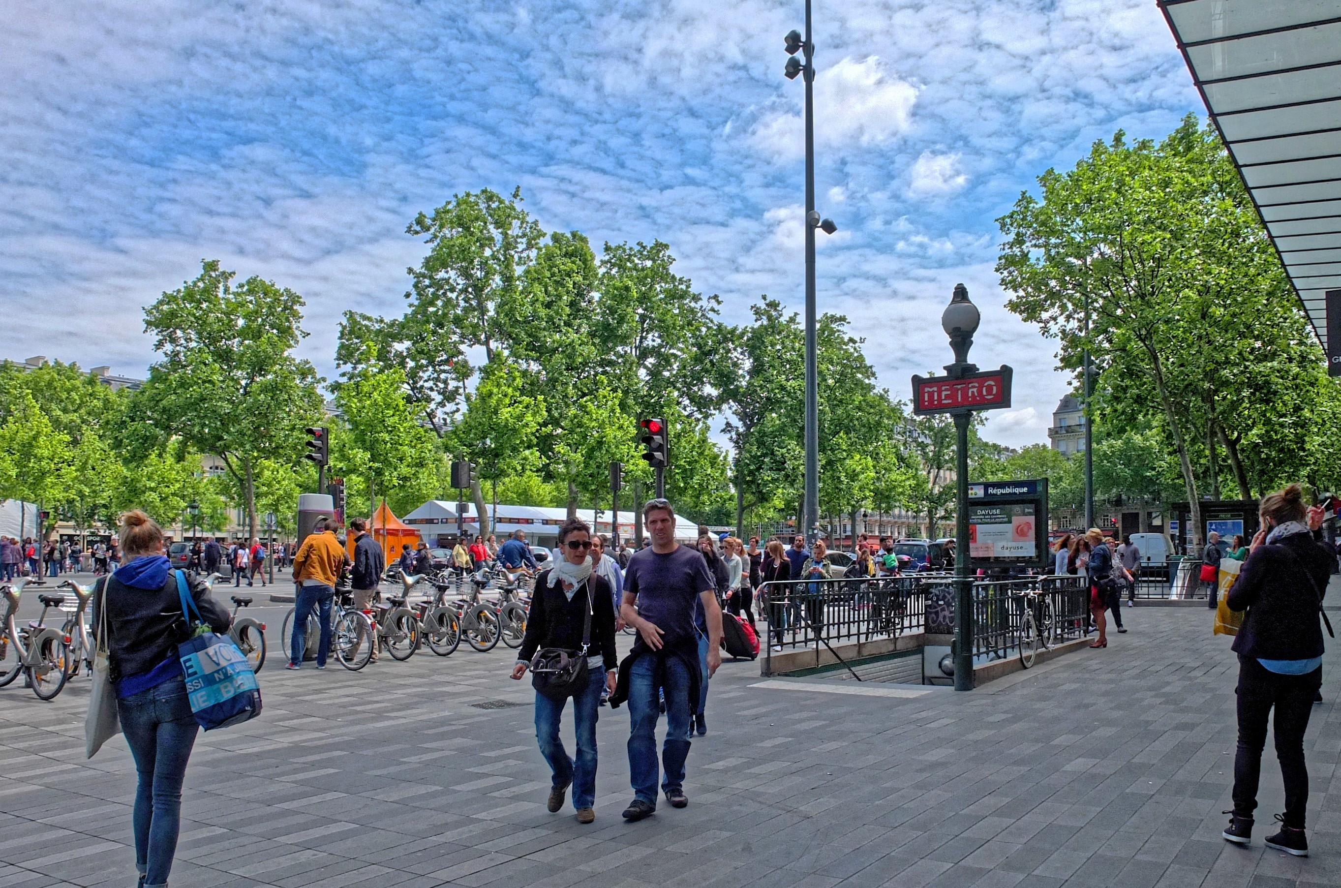 Métro République, Paris.